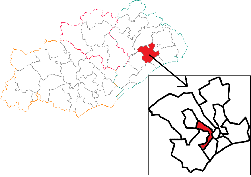 Situation du canton dans le département de l'Hérault.